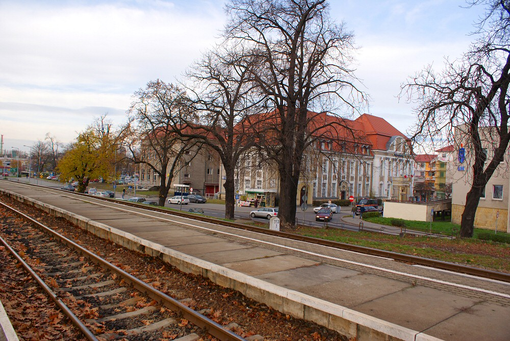 Widok na miasto Żary z nasypu dworcowego